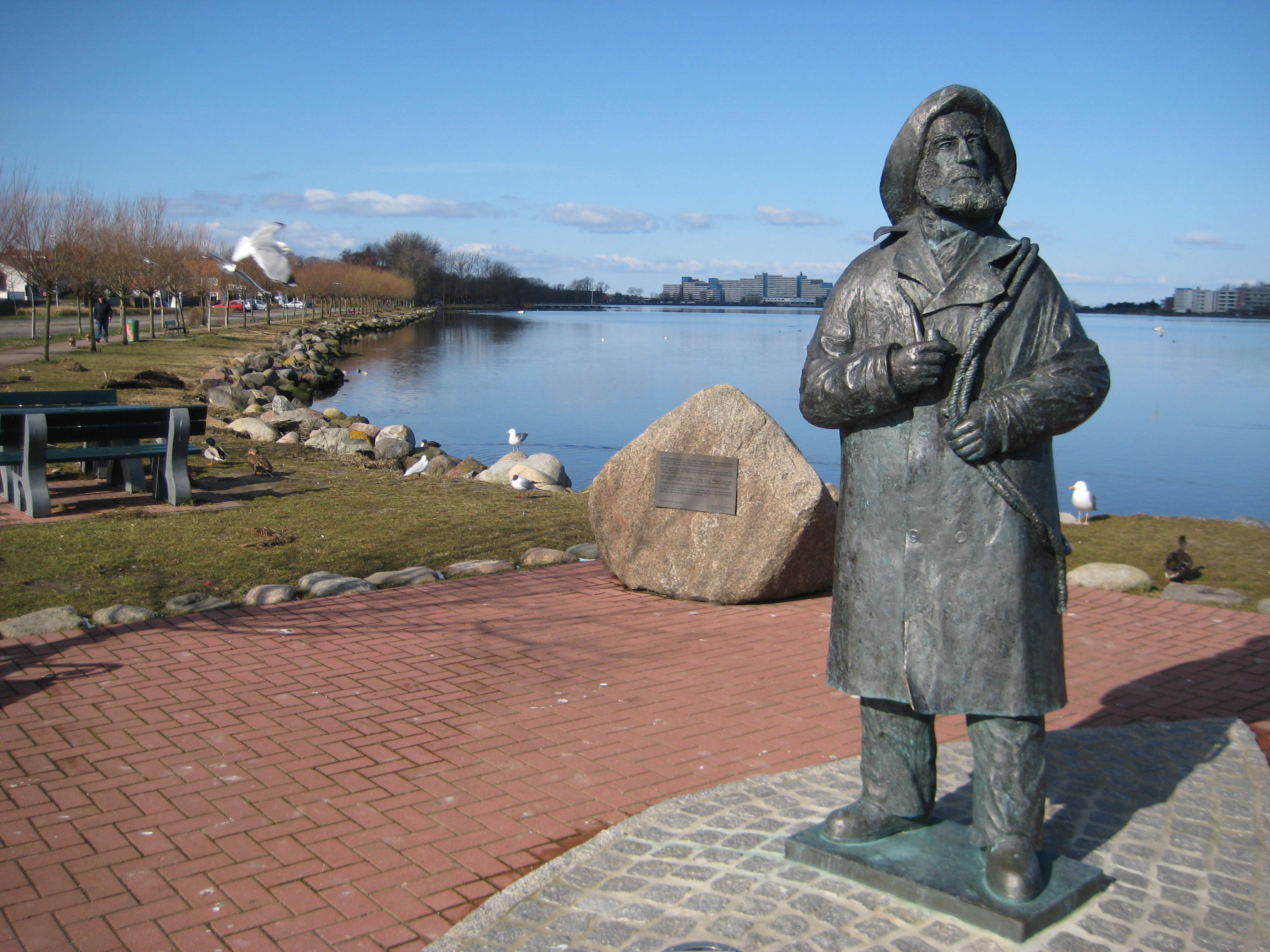 Denkmal des Fischers und späteren Kutschers Gottlieb Friedrich Stüben in Heiligenhafen, geschaffen von Ladisllav Hlina, aufgestellt 2005